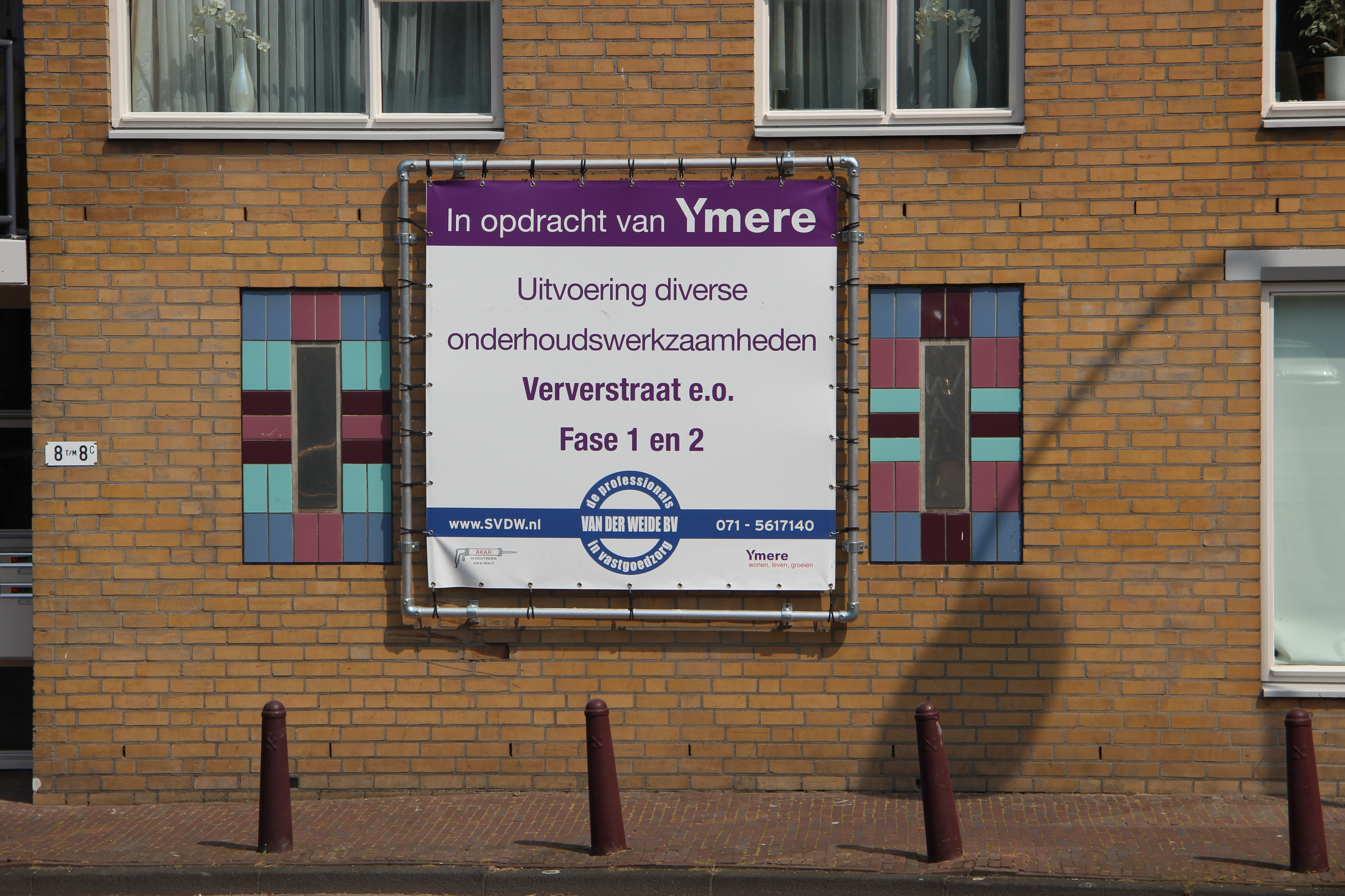 Onderhoud in opdracht van Ymere aan de Herengracht Leiden